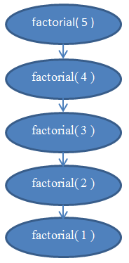 rekurzija